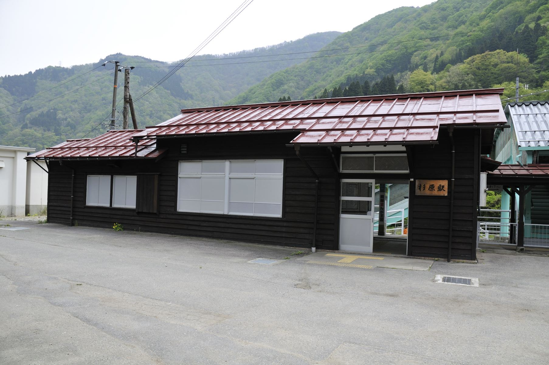 杉原駅駅舎